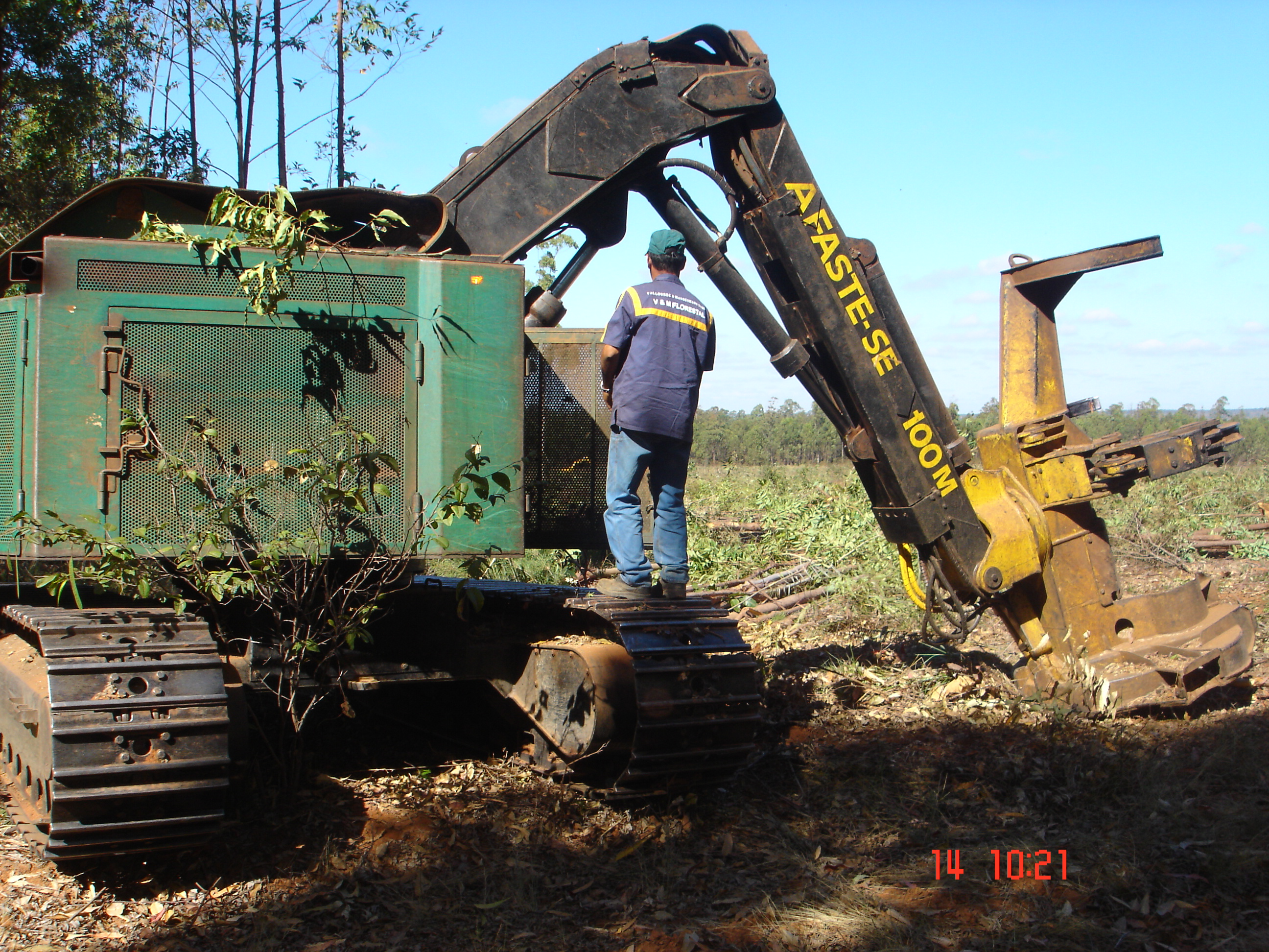 Feller-buncher em colheita em plantação de eucalipto, no Brasil.